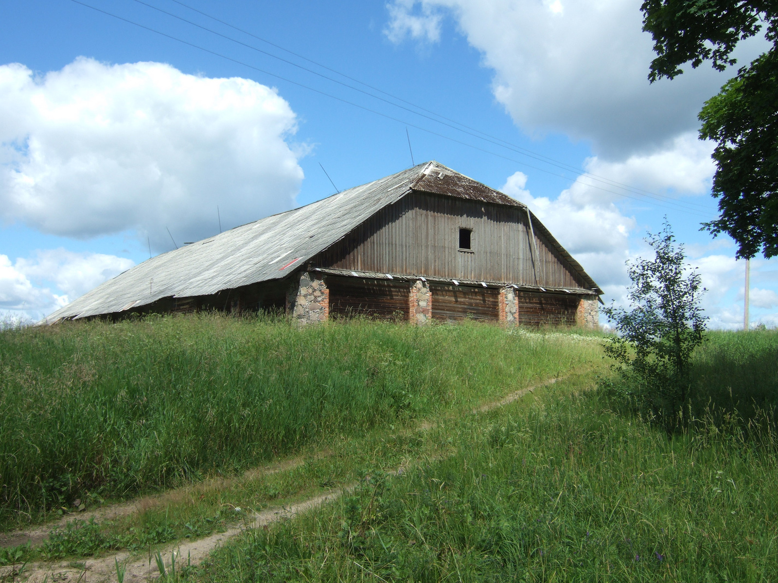 Čiulų dvaro kluonas